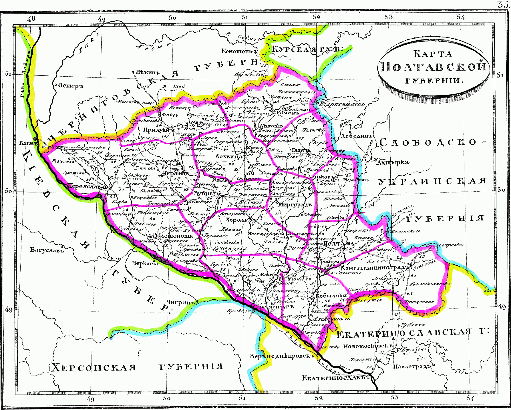 Карта Полтавской губернии, 1835